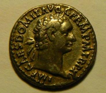 Denier romain de Domitien; IMP[ERATOR] CAES[AR] DOMIT[IANUS] AVG[VSTVS] GERM[ANICVS] P[ONTEFIX] M[AXIMVS] TR[IBUNICIA] P[OTESTAS] XV, RIC II, 191